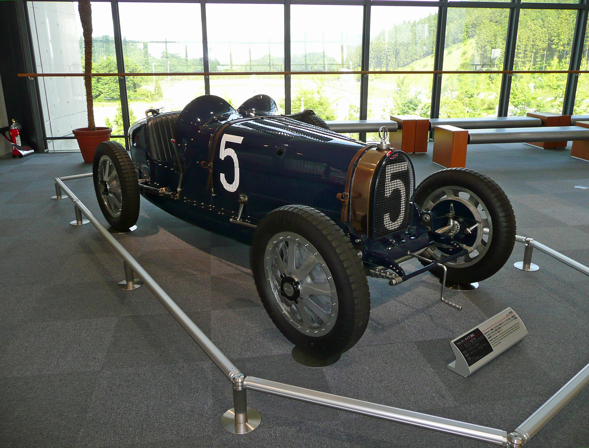 ブガッティ タイプ35C 1926年 ホンダコレクションホールにて撮影